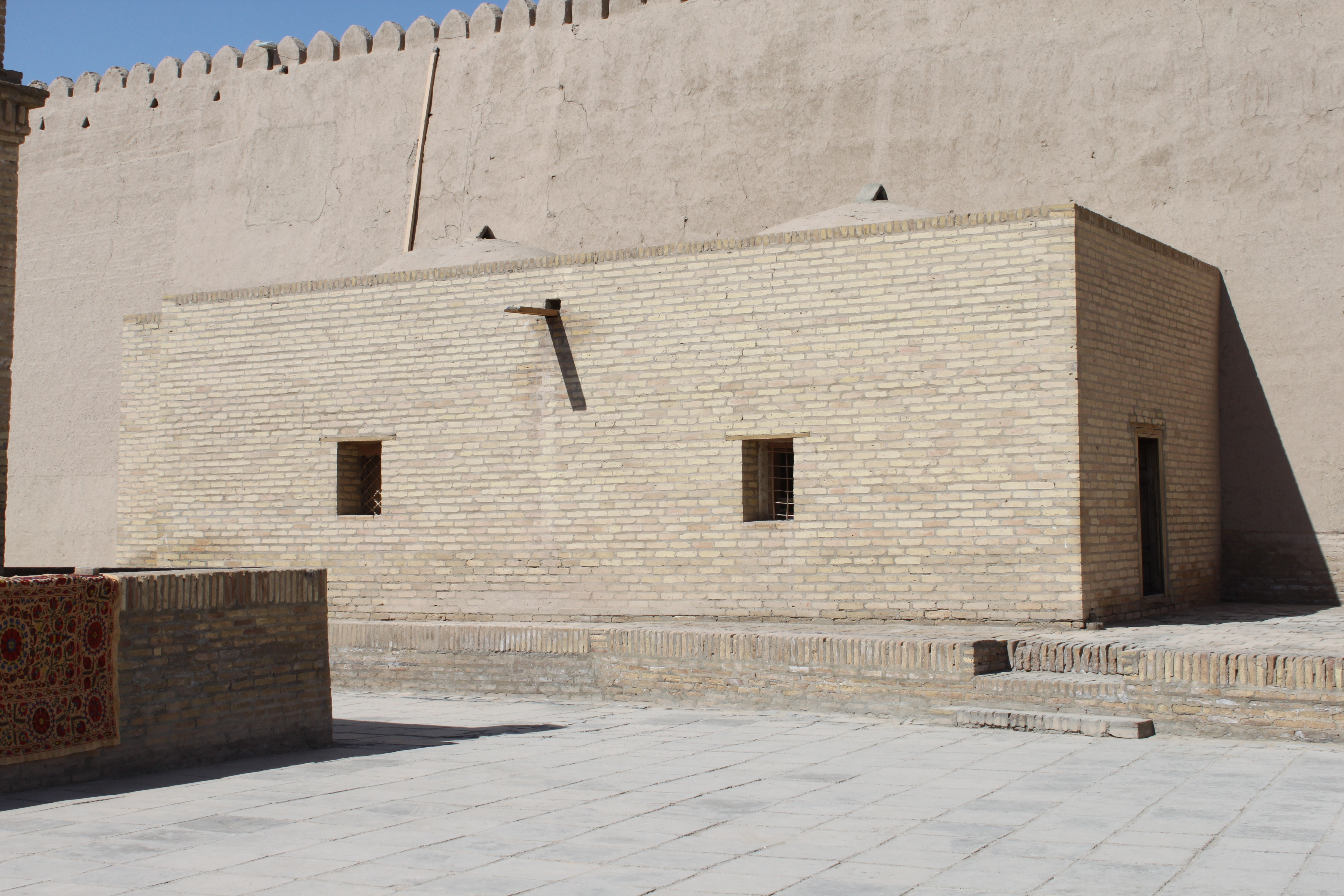 Prison de Konya Ark collée à l'enceinte extérieure (Khiva)